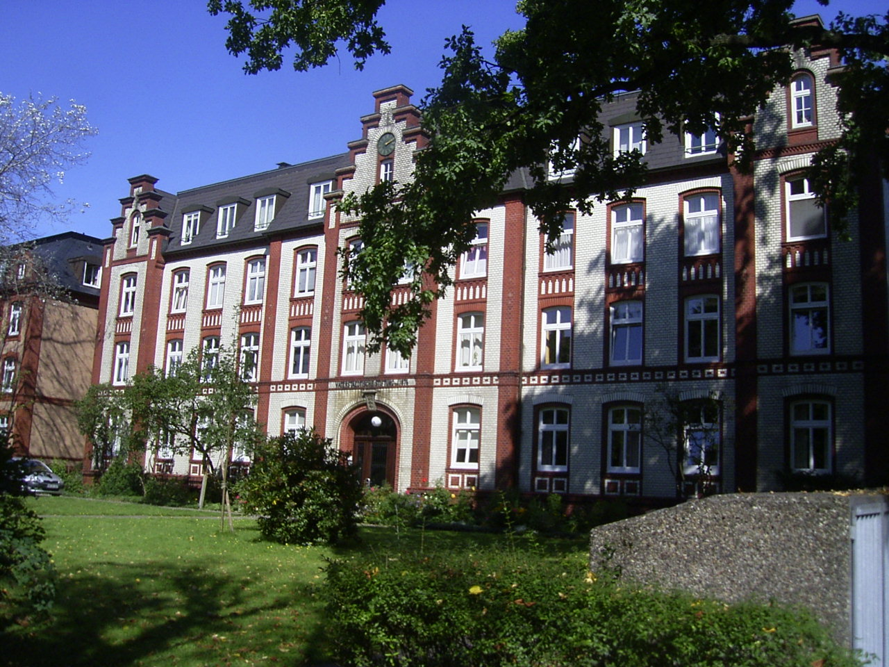 Das Julius-Ernst-Oppenheim-Stift der Vaterstädtischen Stiftung in der Frickestraße 24 in Eppendorf wurde 1909 nach Plänen von Stammann & Zinnow errichtet.